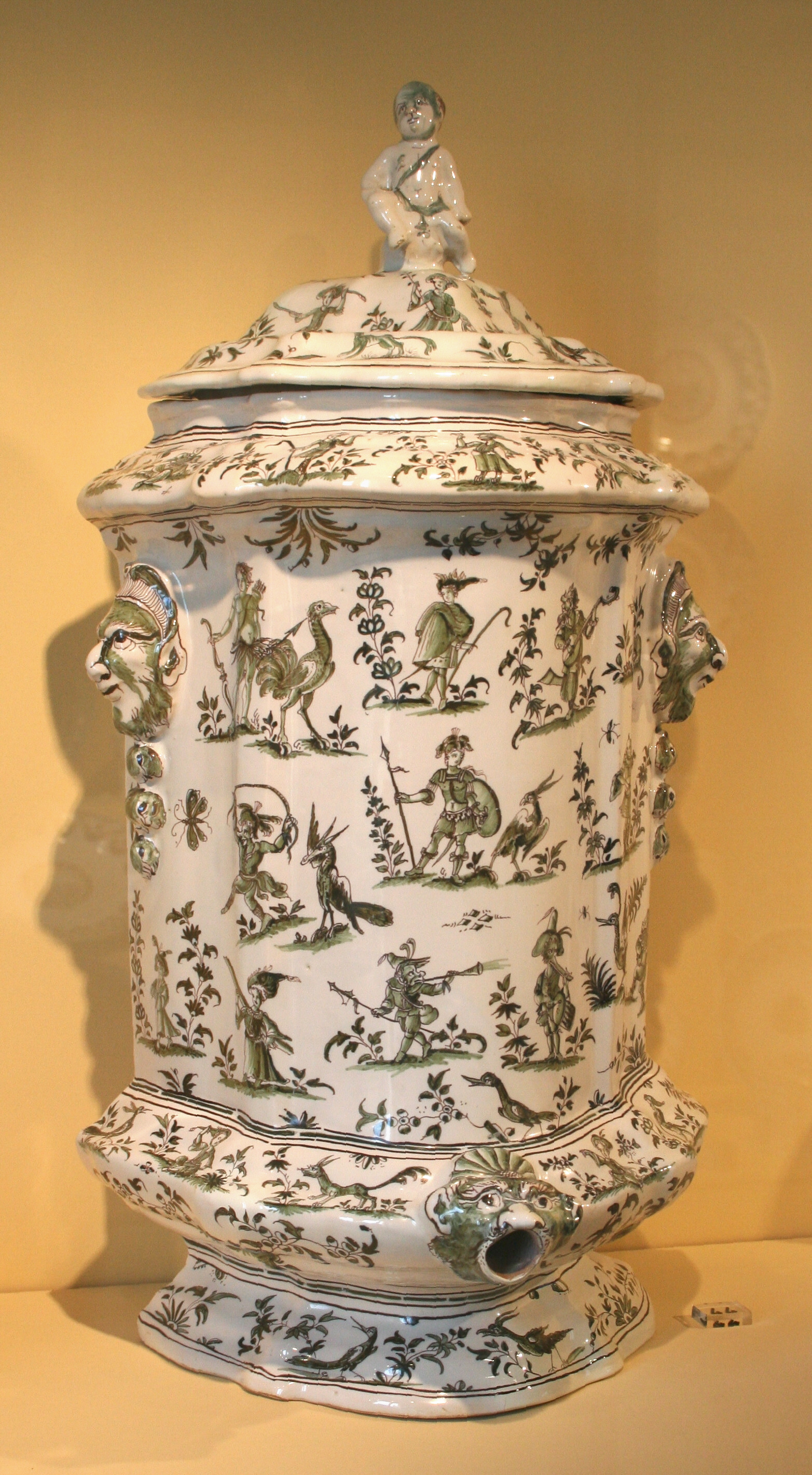 Musée de la faïence à Marseille, fontaine des ateliers Olérys et Laugier à Moustiers, décor grand feu vert et manganèse, hauteur=51cm largeur=28cm.